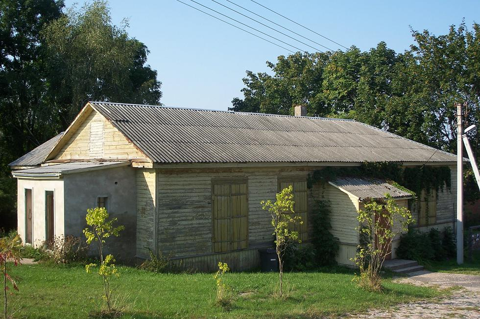 Semeliškių kultūros klubas